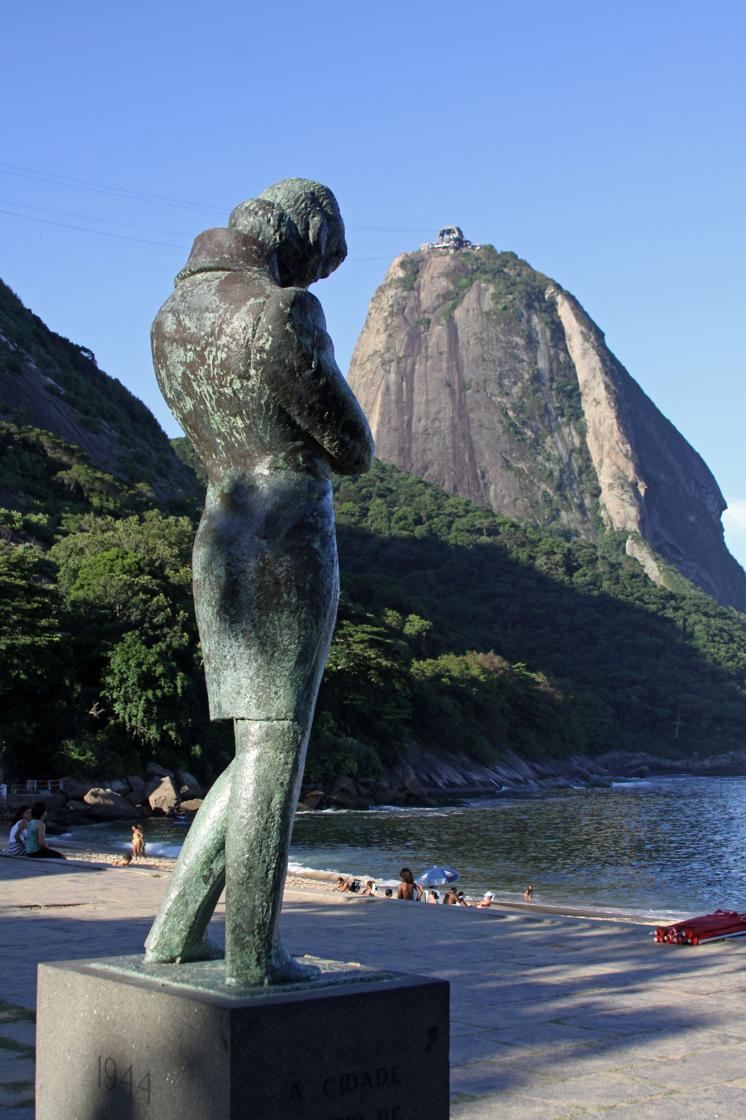 Monumento a Chopin na Praia Vermelha